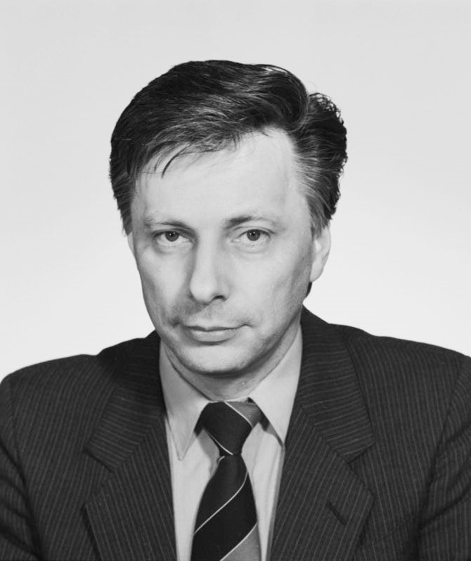 ADN-ZB/Schöps/9.3.90/Berlin: Prof. Dr. Rainer Ortleb, Vorsitzender der LDP